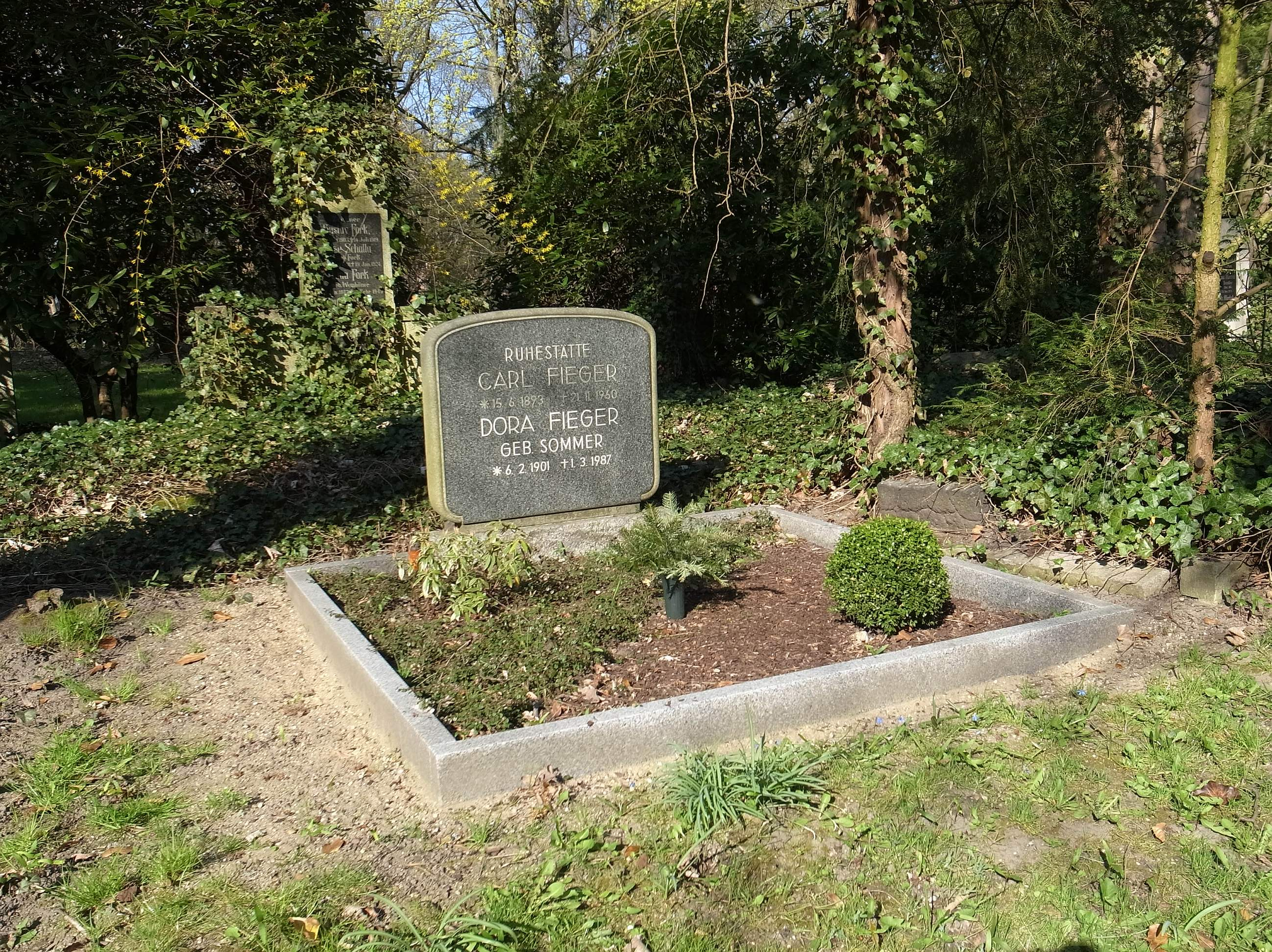 Ruhestätte von Carl Fieger in Dessau auf dem Friedhof III